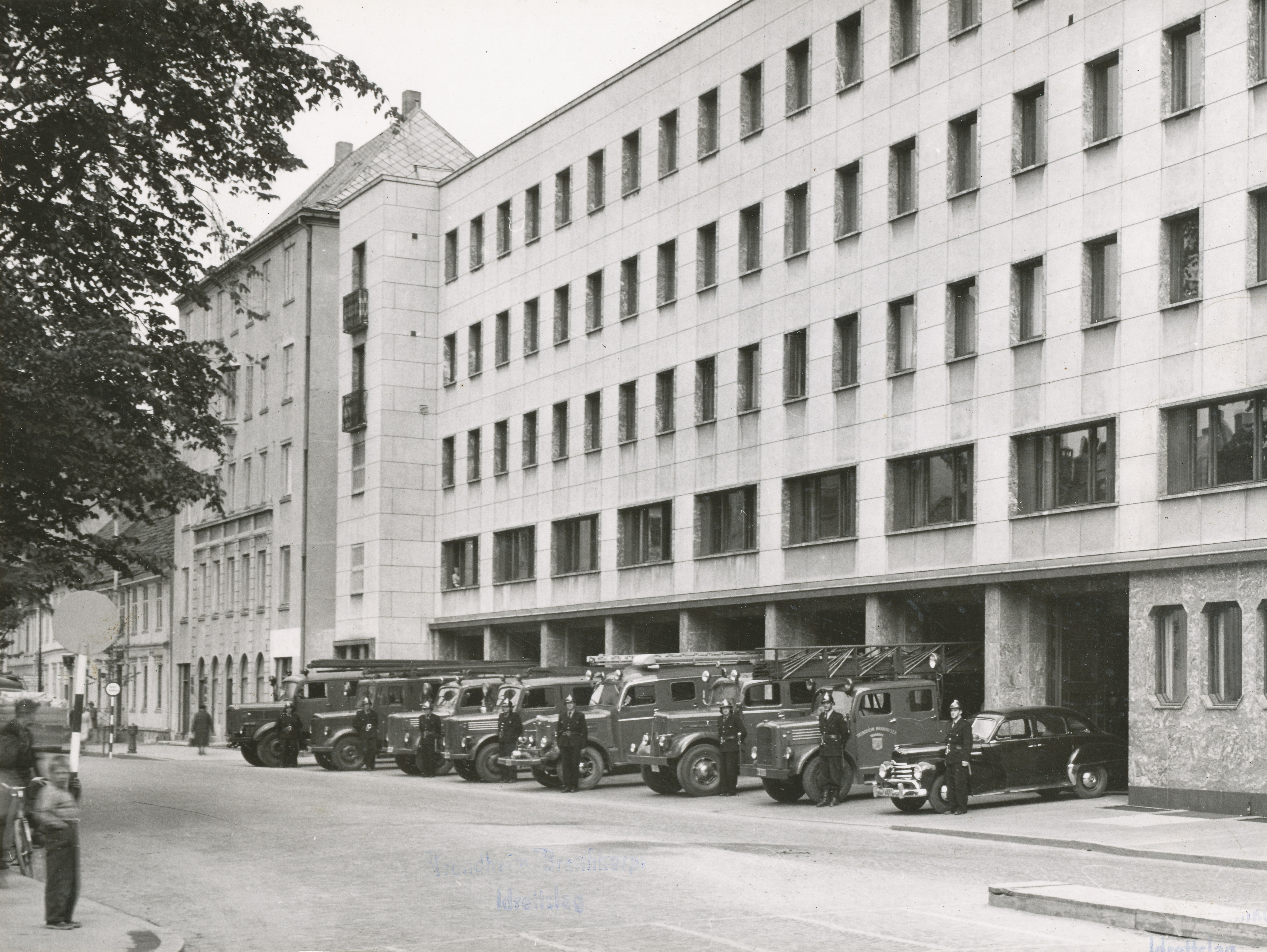 Trondheim brannstasjons 1. byggetrinn var ferdig i 1943. 2. byggetrinn var ferdig i 1952. Ukjent fotograf, ukjent år. Fra Trondheim Brannvesens arkiv.